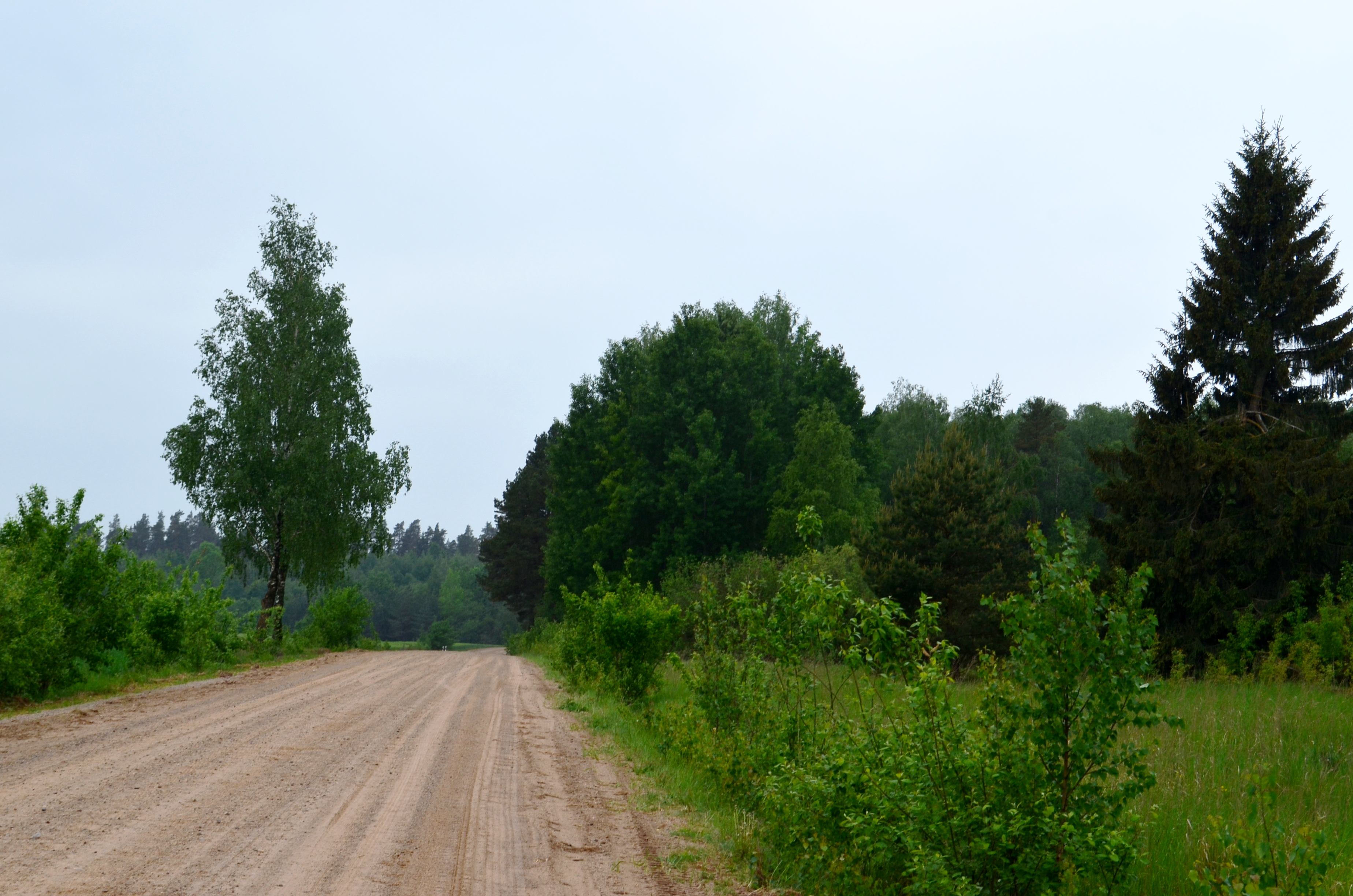 Papušynio miškas šalia Kadylų, Radviliškio r.